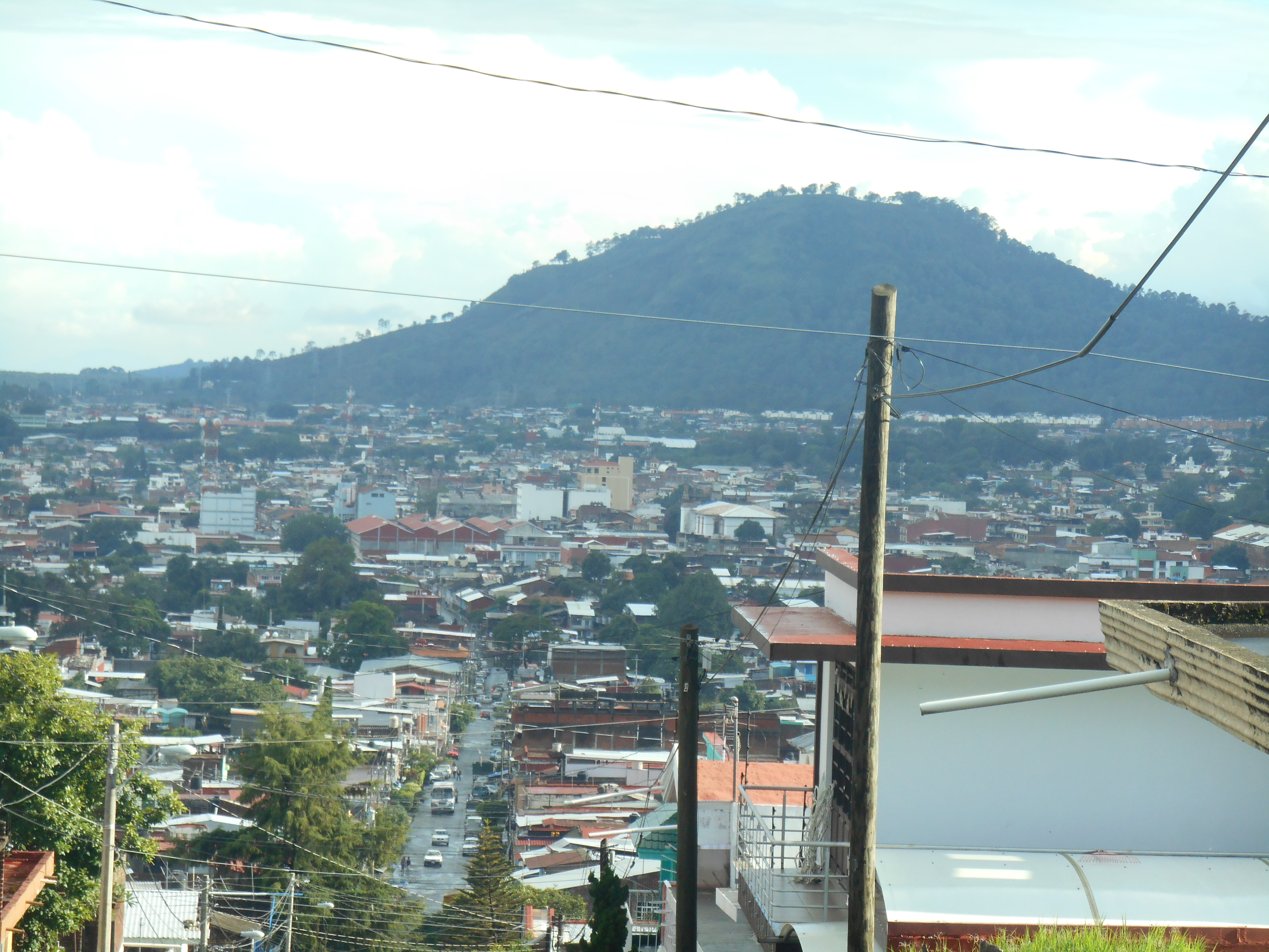 Vista hacia el centro de la ciudad de Uruapan y montaña — en el Municipo de Uruapan, estado de Michoacán.